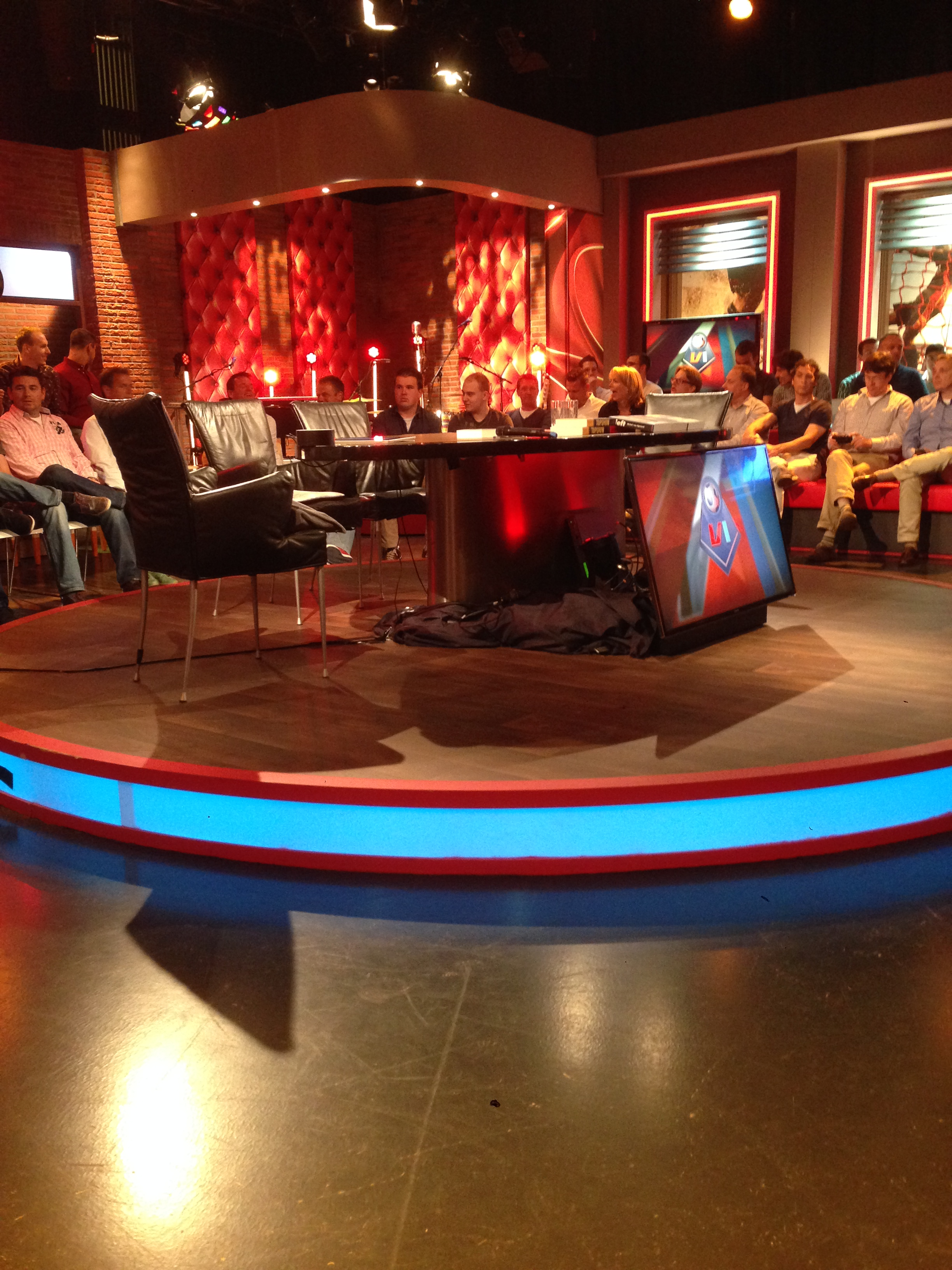 Voetbal Inside in Studio2